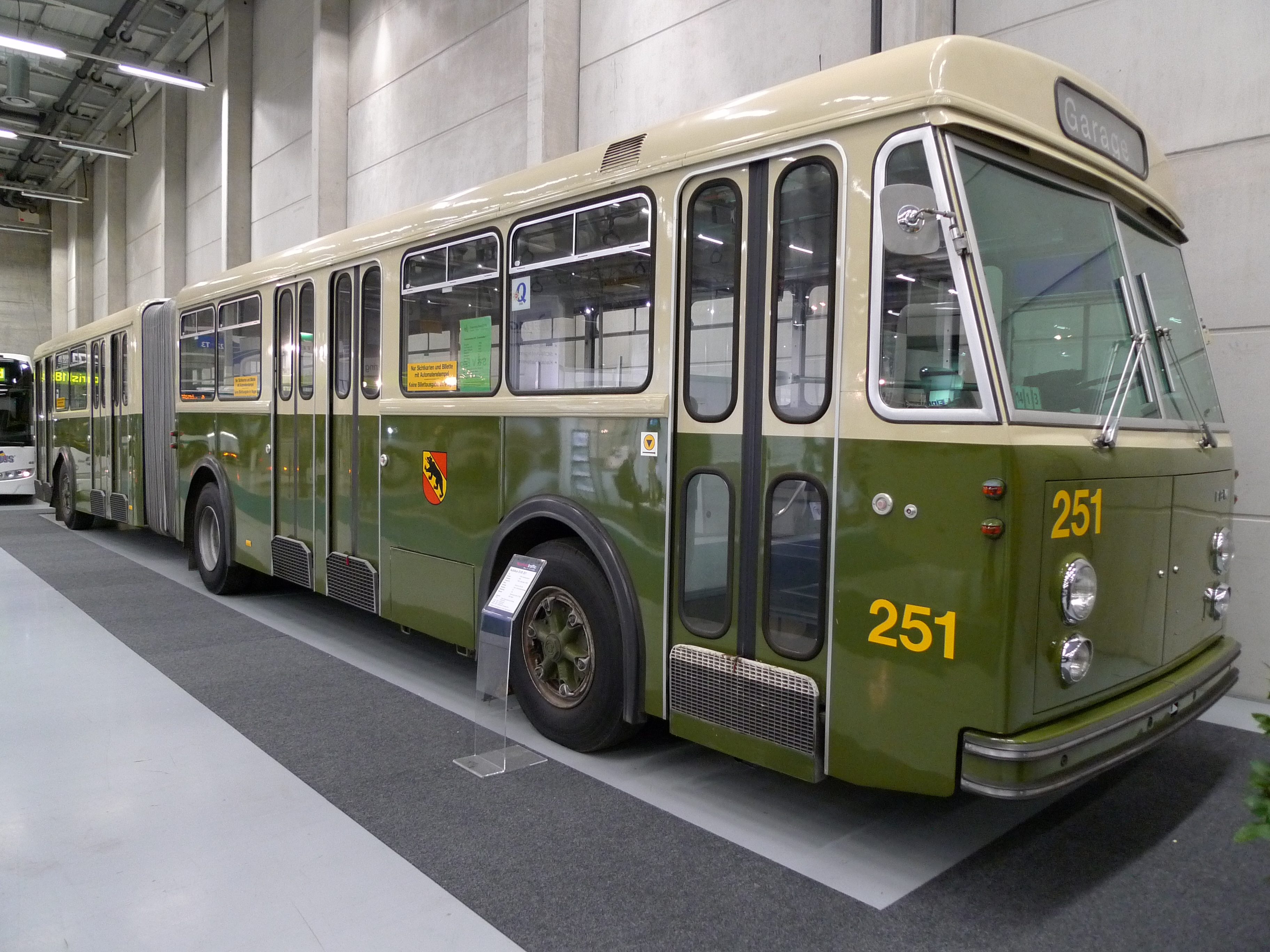 FBW/Ramseier/SWS Gelenkautobus, Baujahr 1965, Motor EDUA-H 250PS, Sitzplätze 35, Stehplätze 105.